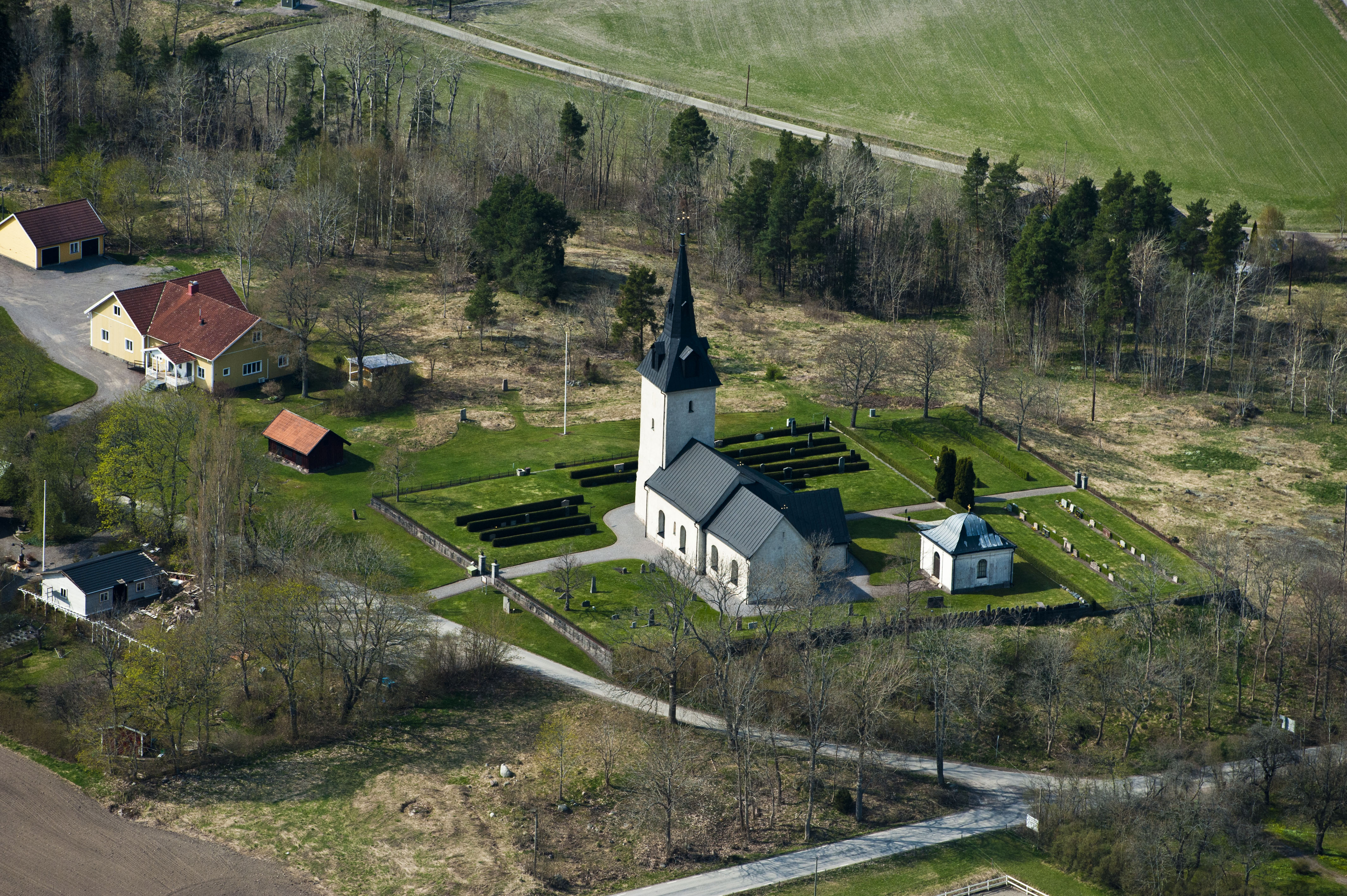 Furingstads ka